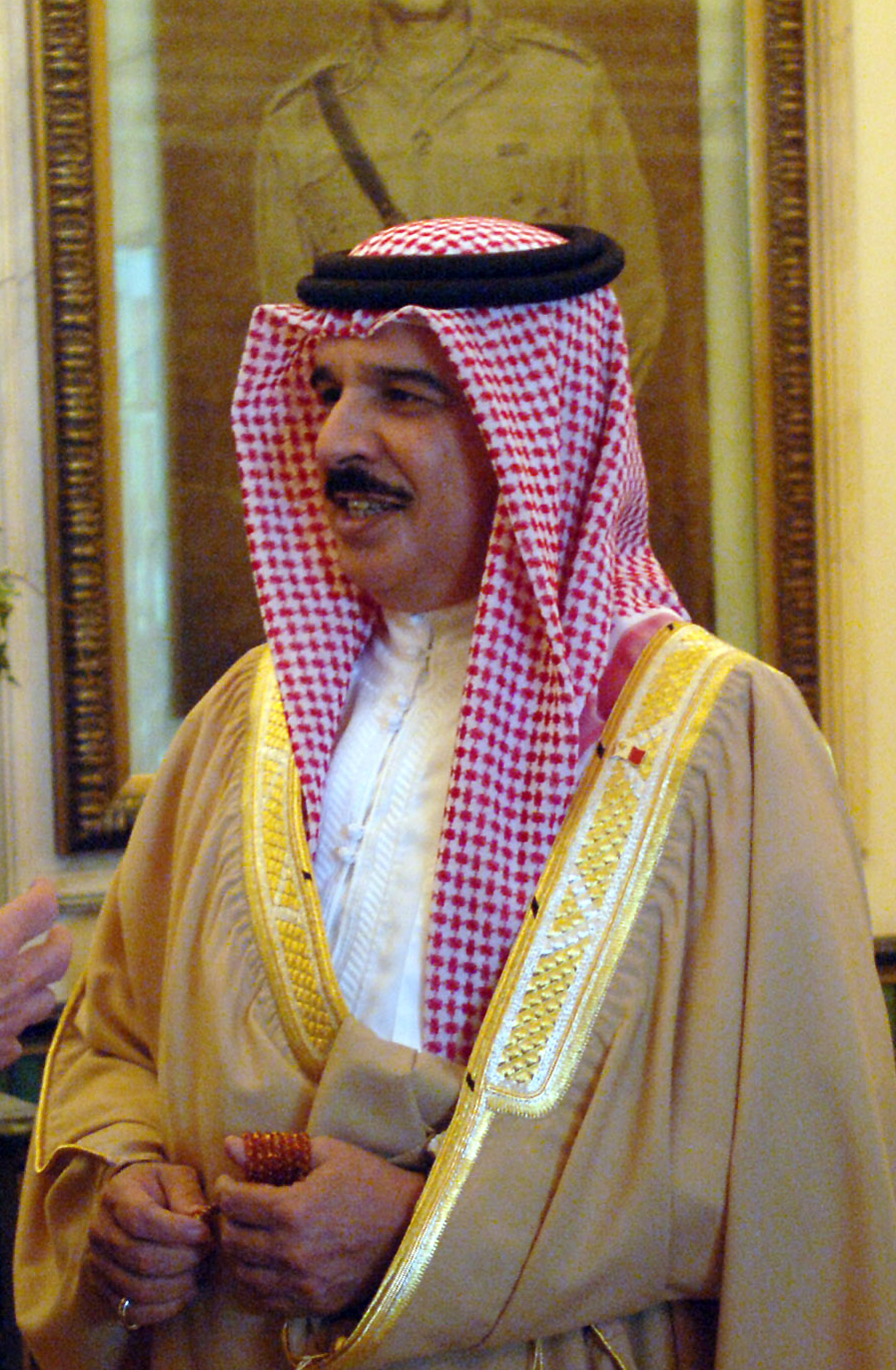 070122-N-9594C-001 Manama, Bahrain - King of Bahrain Hamad Bin Isa Al-Khalifa